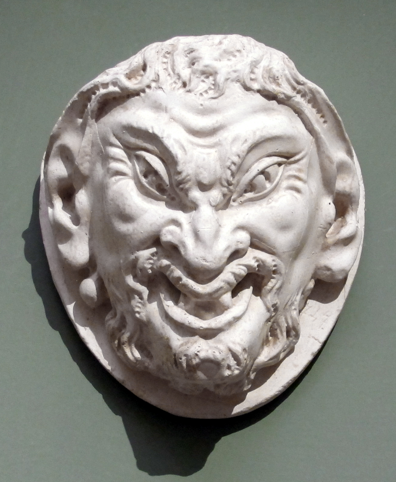 Calco della testa di satiro attr. al buonarroti e rubato dal bargello nel 1944.JPG